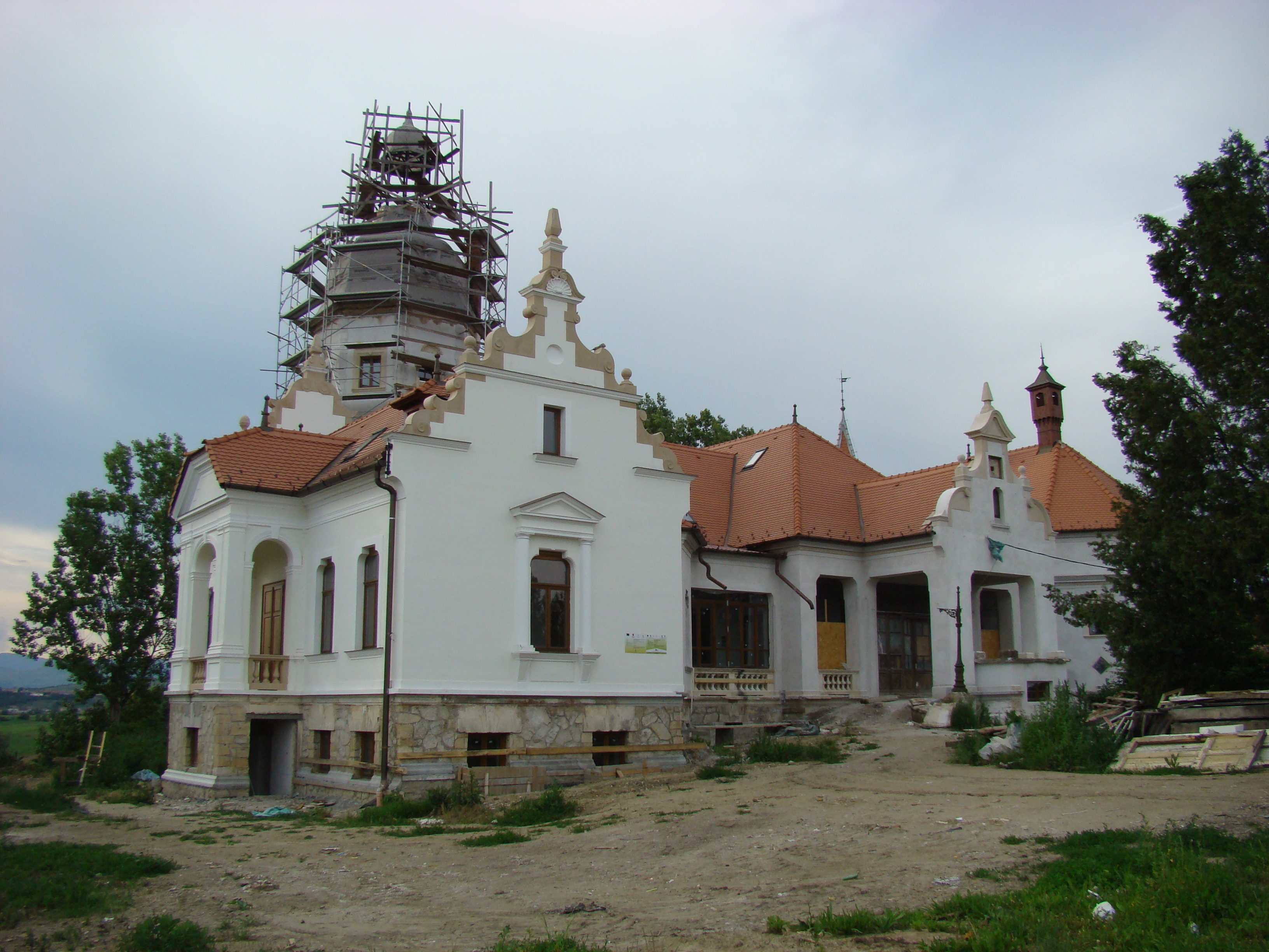 Castelul Banffi, sat aparținător Sâncrai; municipiul Aiud, județul Alba 01